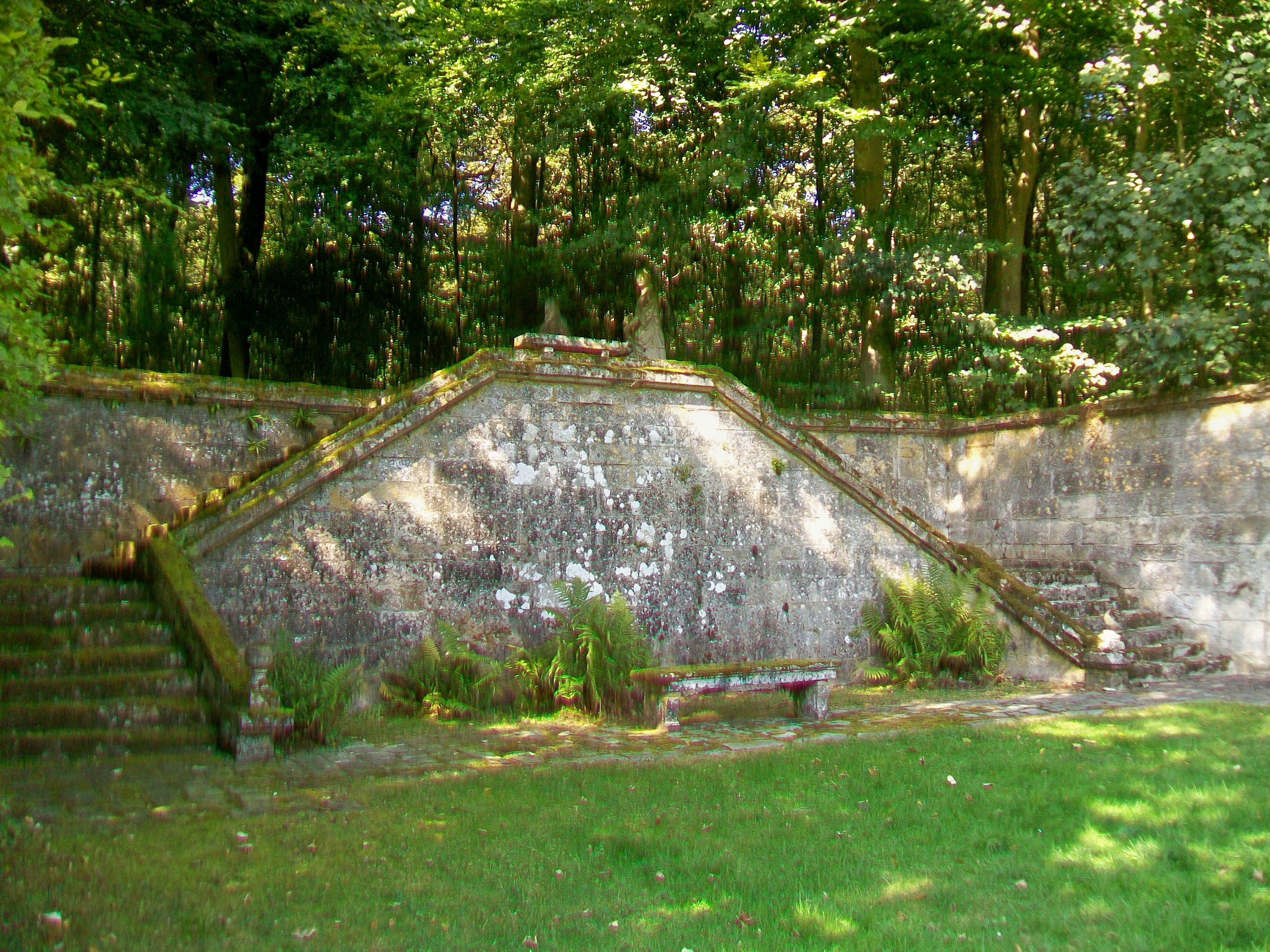 Double escalier menant vers la terrasse avec la salle de verdure à l'ouest du miroir d'eau. De part et autre de cette terrasse, se trouvent les statues représentant les Saisons ; en part une allée qui croise l'allée du Mail perpendiculairement et mène vers la statue de Diane.